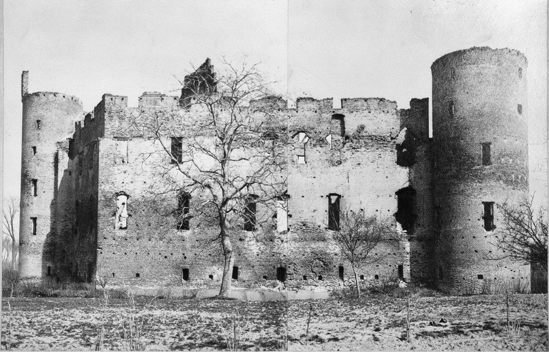 'T Huis De Haar: ruïne, vanuit het zuiden